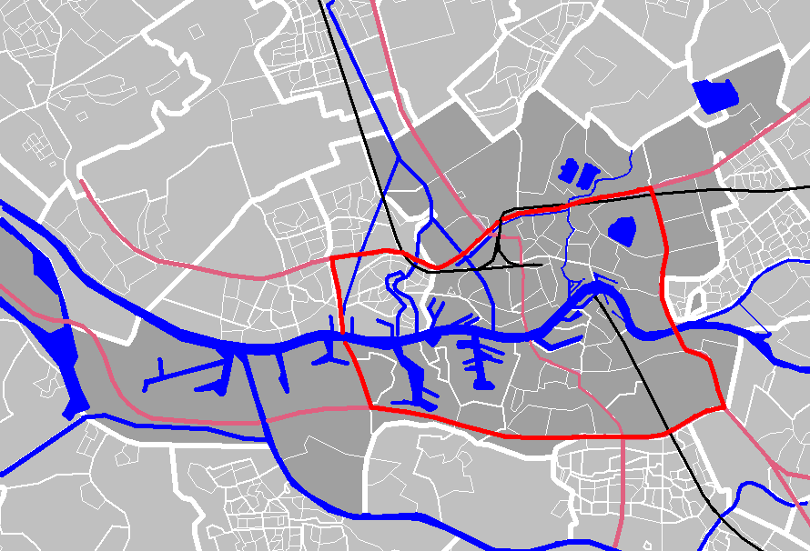 Rotterdam districts/neighboorhoods